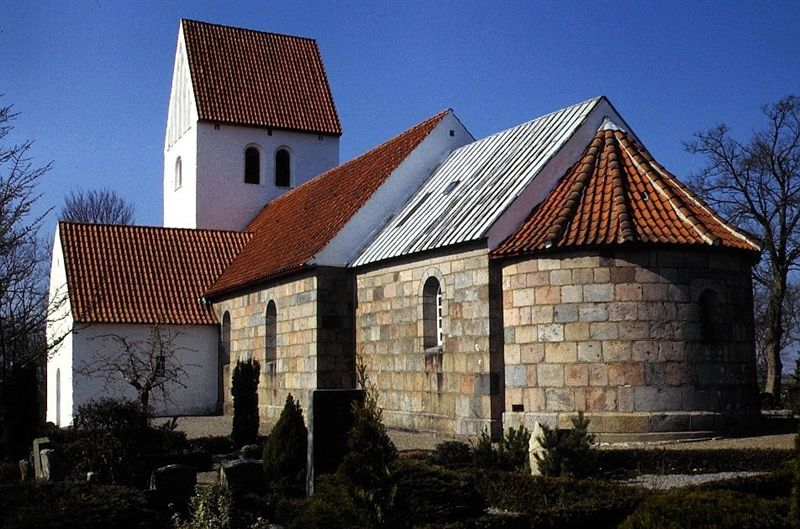 Grønning Kirke set fra sydøst, Skive Kommune, Jylland, Denmark